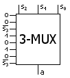 Anwendungsbeispiel 3-MUX Realisierung der Funktion f mit einem 3-MUX (Prinzip)